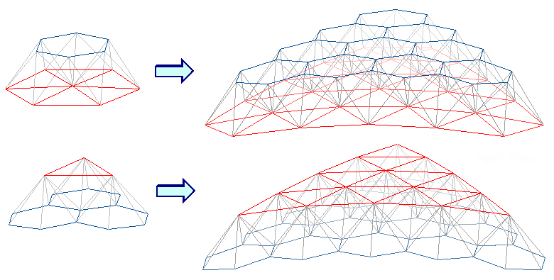 Les 2 façons de renforcer une géode (geodesic dome) en doublant sa structure par une structure duale de mêmes paramètres